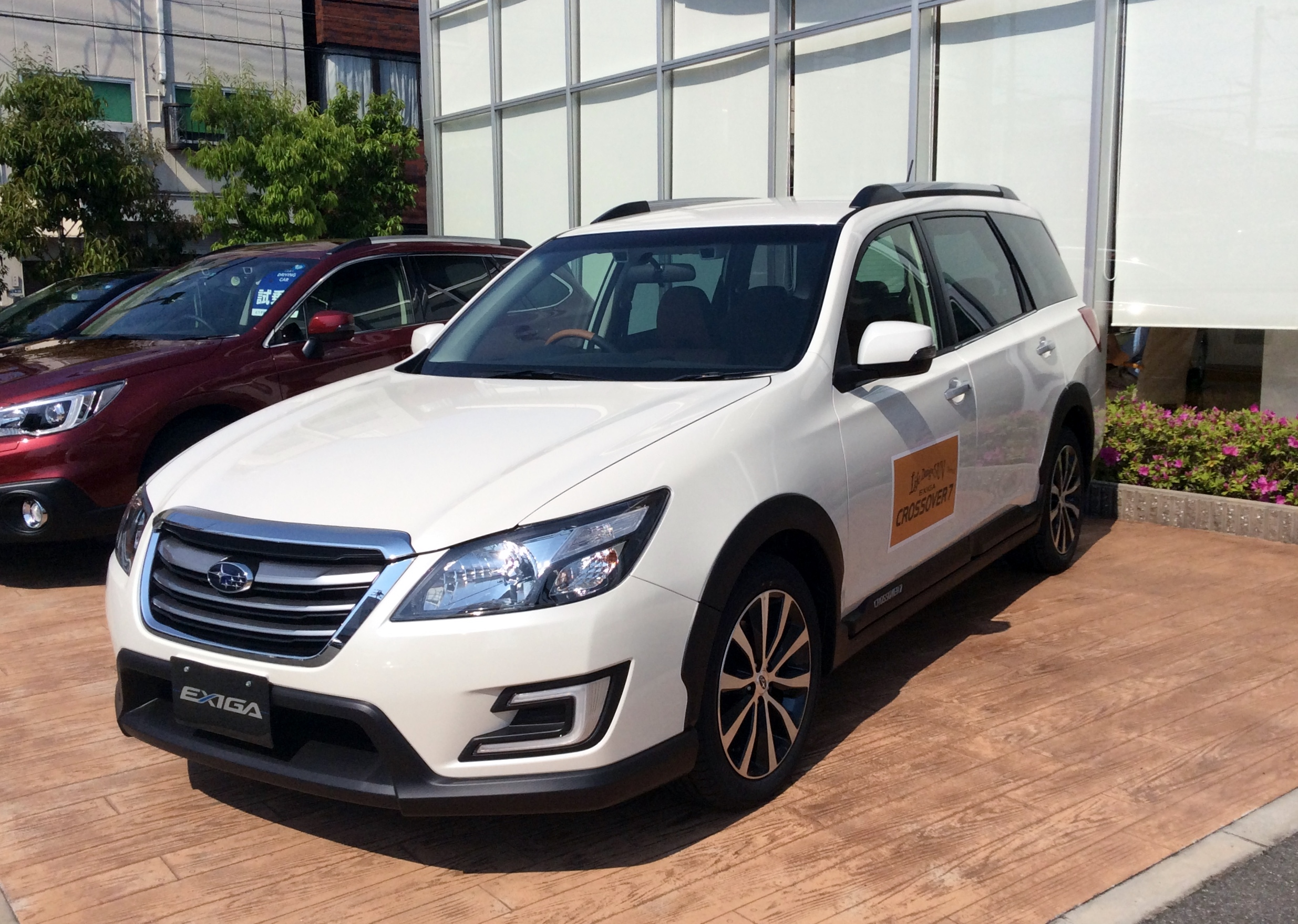 YAM型スバル・エクシーガクロスオーバー7をフロントから撮影。